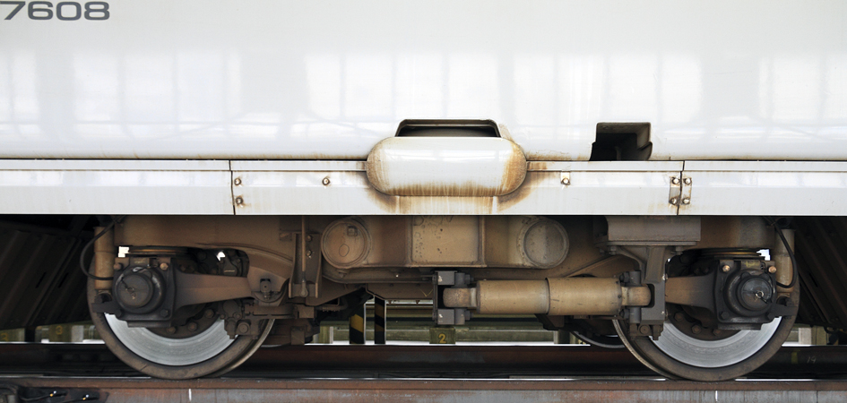 JR西日本 700系7000番台新幹線電車 725-7608 WDT205A台車